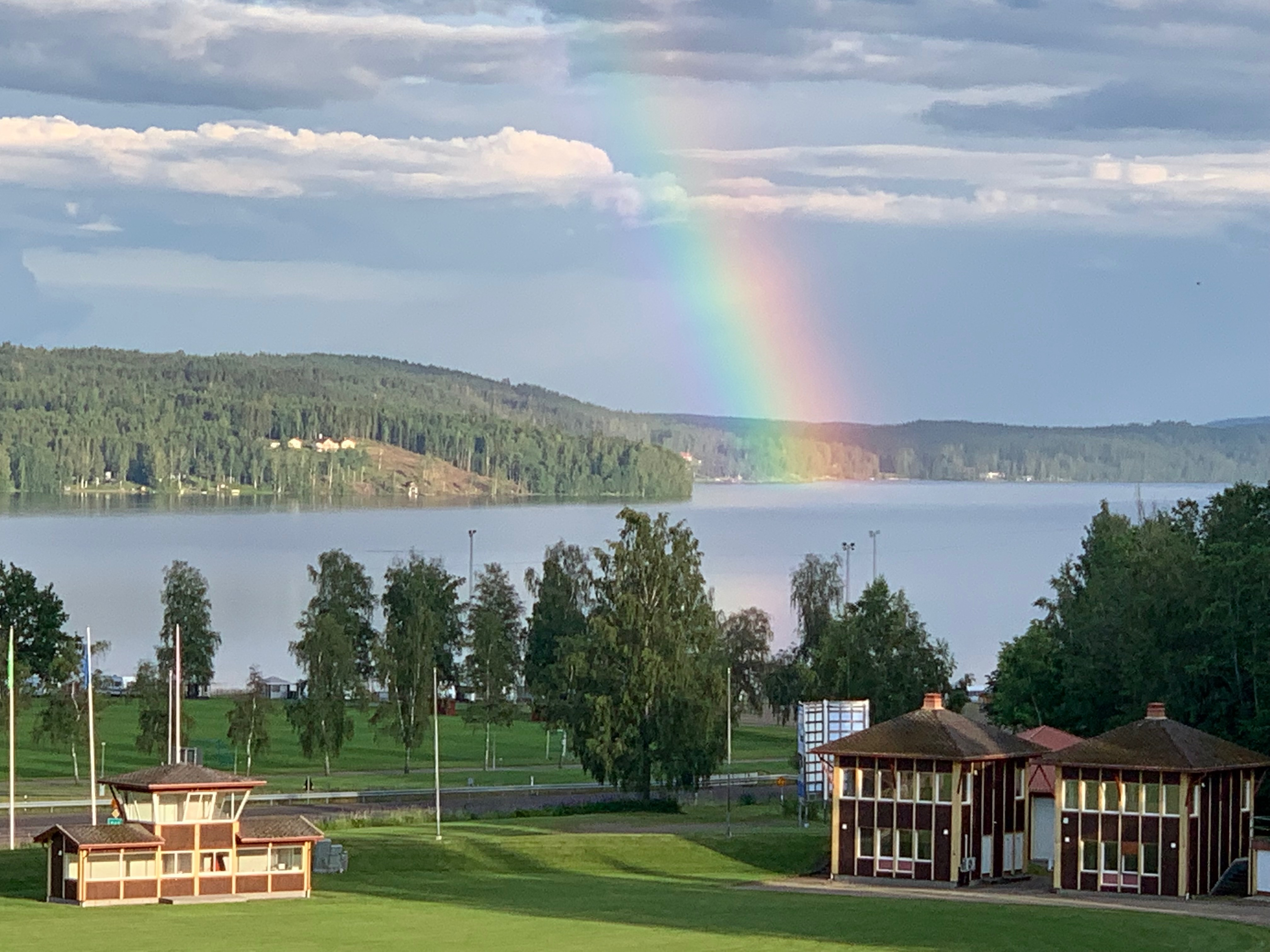 Regnbåge över Fryken från terrassen på Selma spa